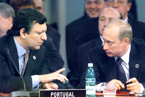 ПРАТИКА-ДИ-МАРЕ (база ВВС Италии). На заседании саммита Россия–НАТО. С Премьер-министром Португалии Жозе Мануэлом Дураном Баррозу.